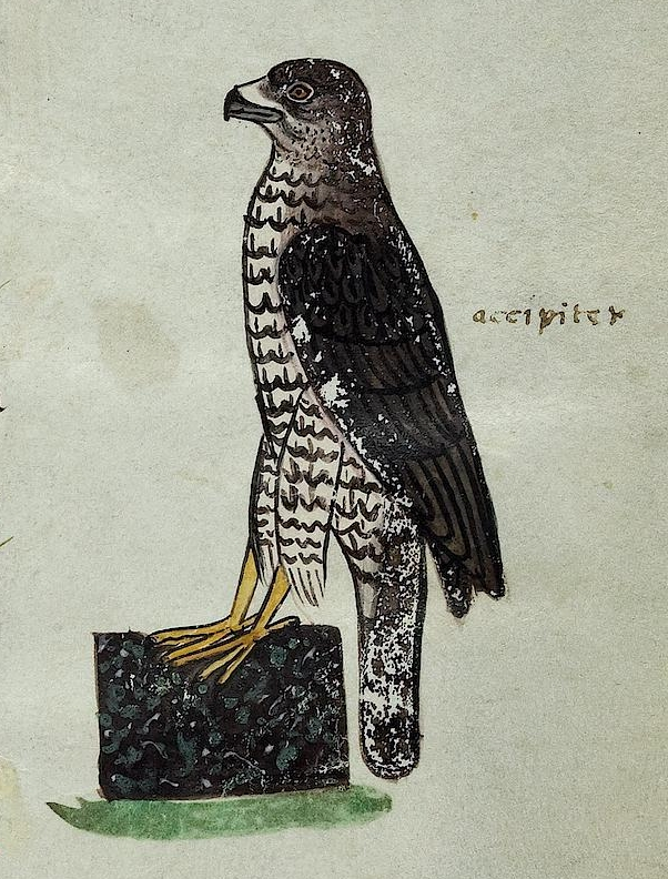 „accipiter“ (Sperber), Falkenbuch von Kaiser Friedrich II., Seite 025r, 1258-1266.